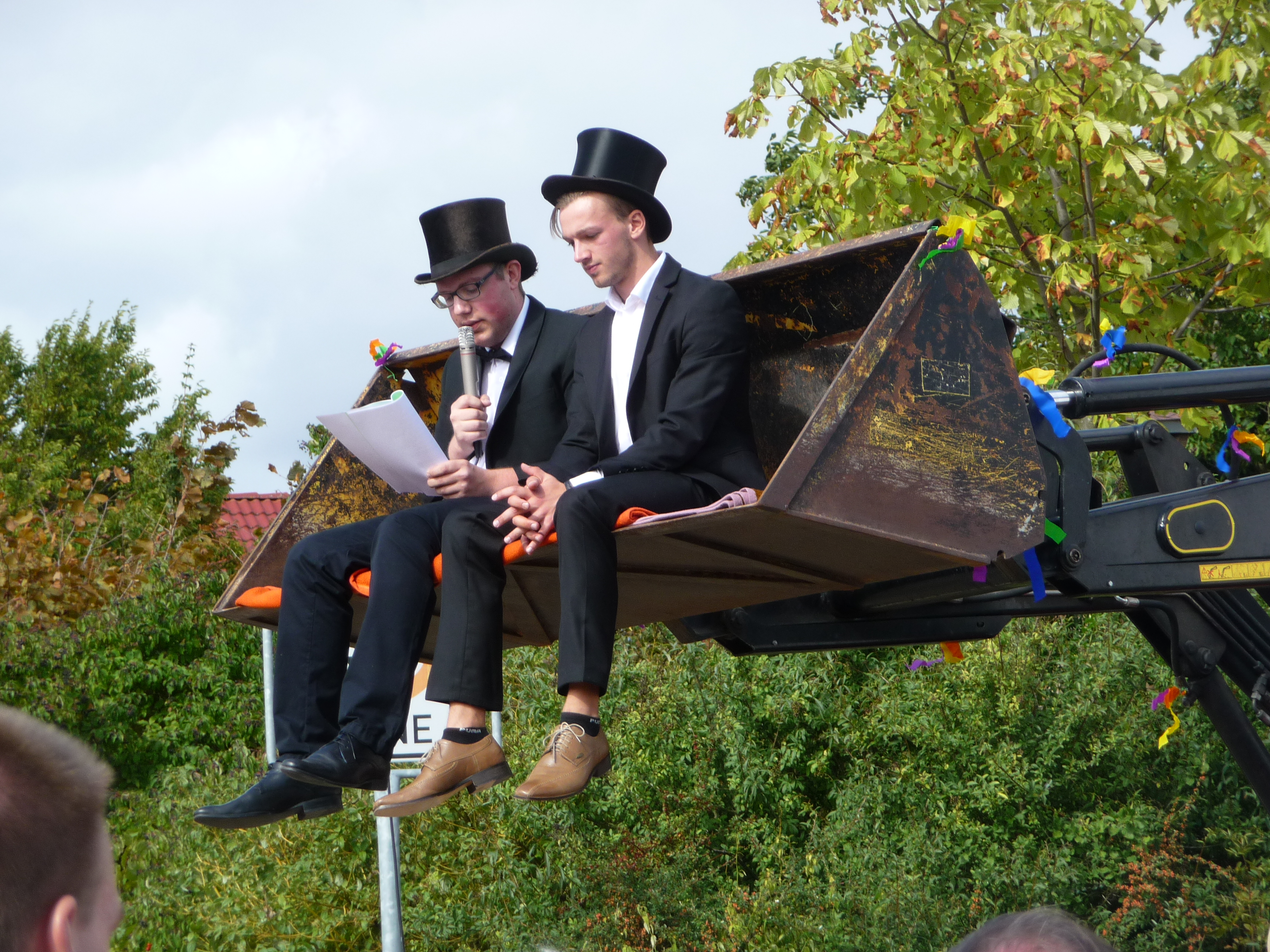 Rüssinger Kirchweih